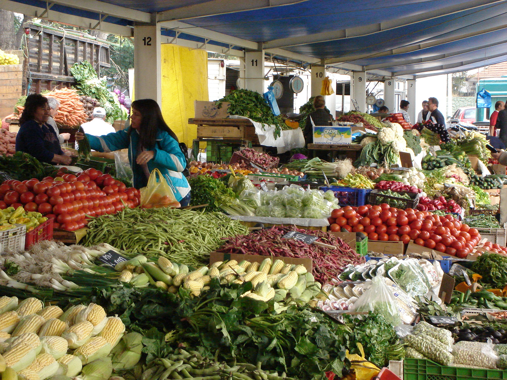 Los sábados se instala una Feria Libre en el parque Los Dominicos, Las Condes Santiago de Chile